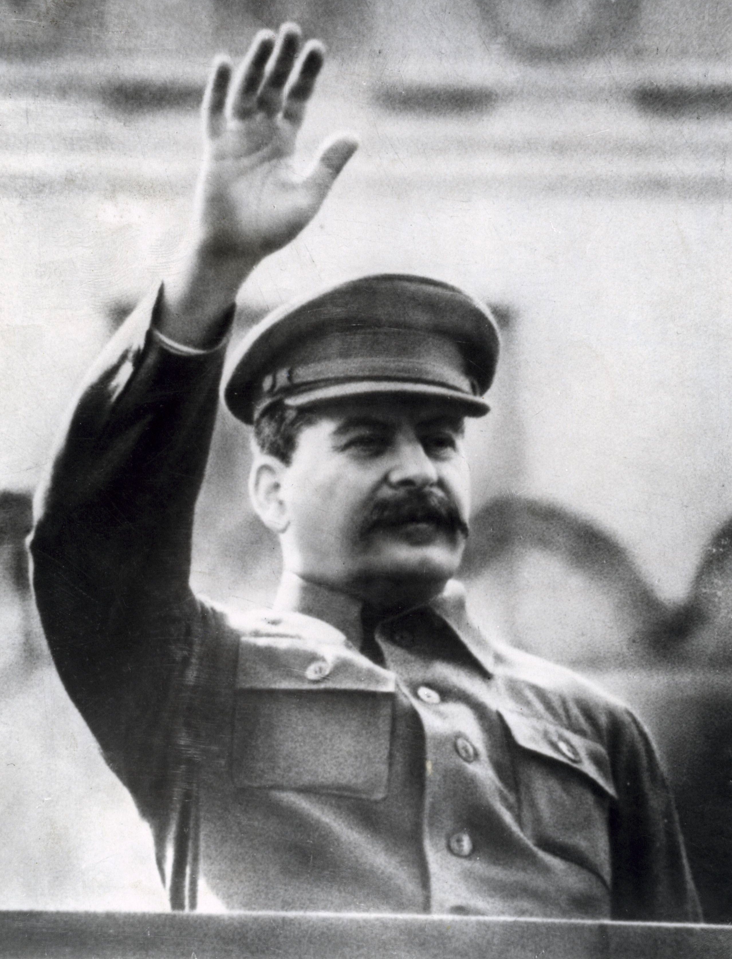 Na de Tweede Wereldoorlog. Een foto van een zwaaiende Stalin uit 1941, die in maart 1953 op de leeftijd van 73 jaar een beroerte kreeg. Rusland. 1941.